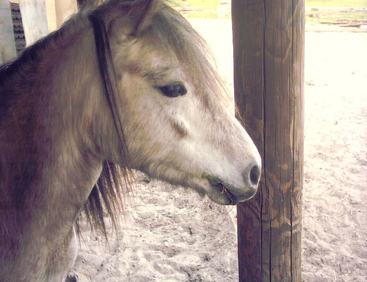 Welshpony "Luna"im Stall